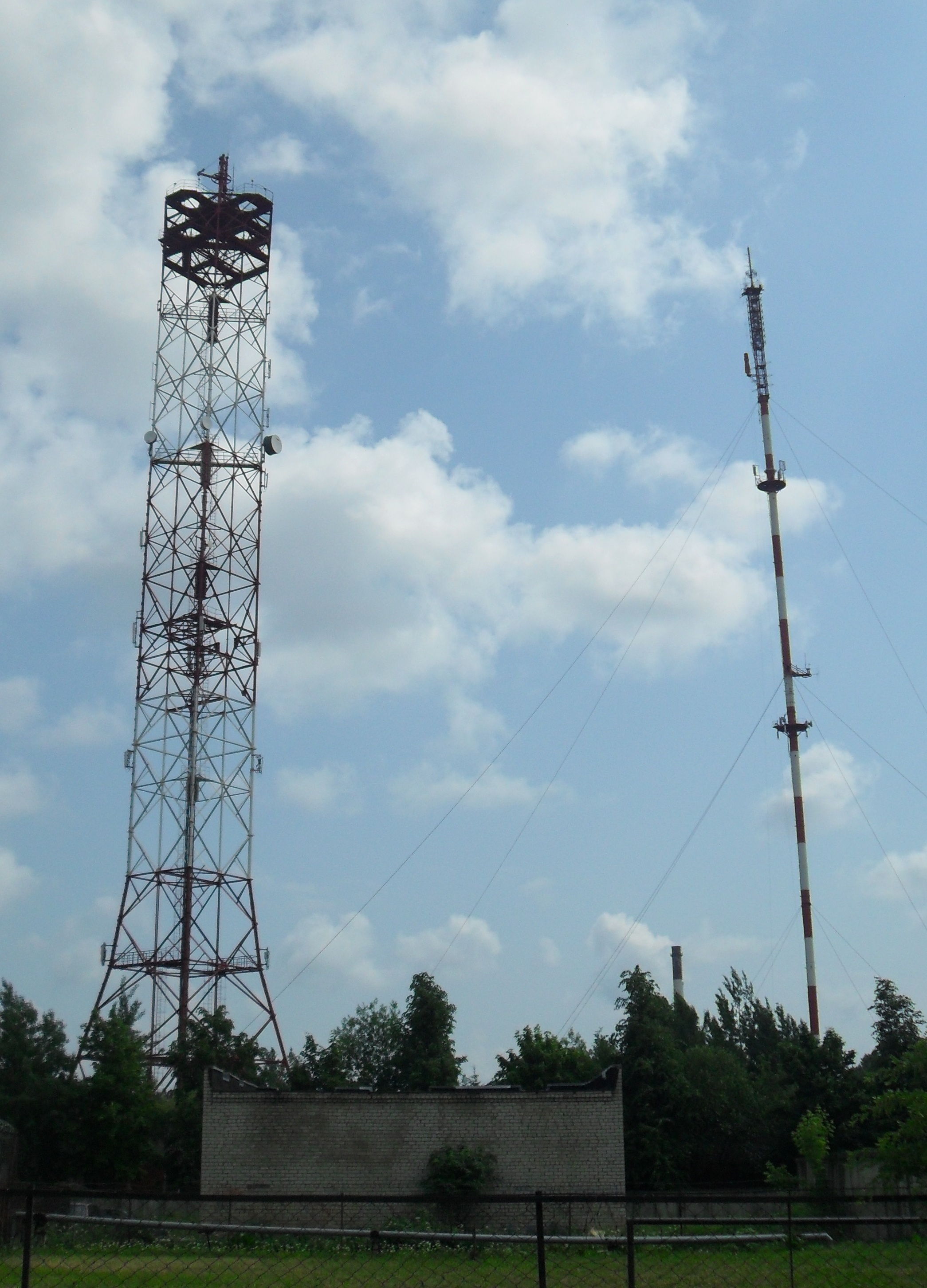 Телебашня в городе Псков на Завеличье